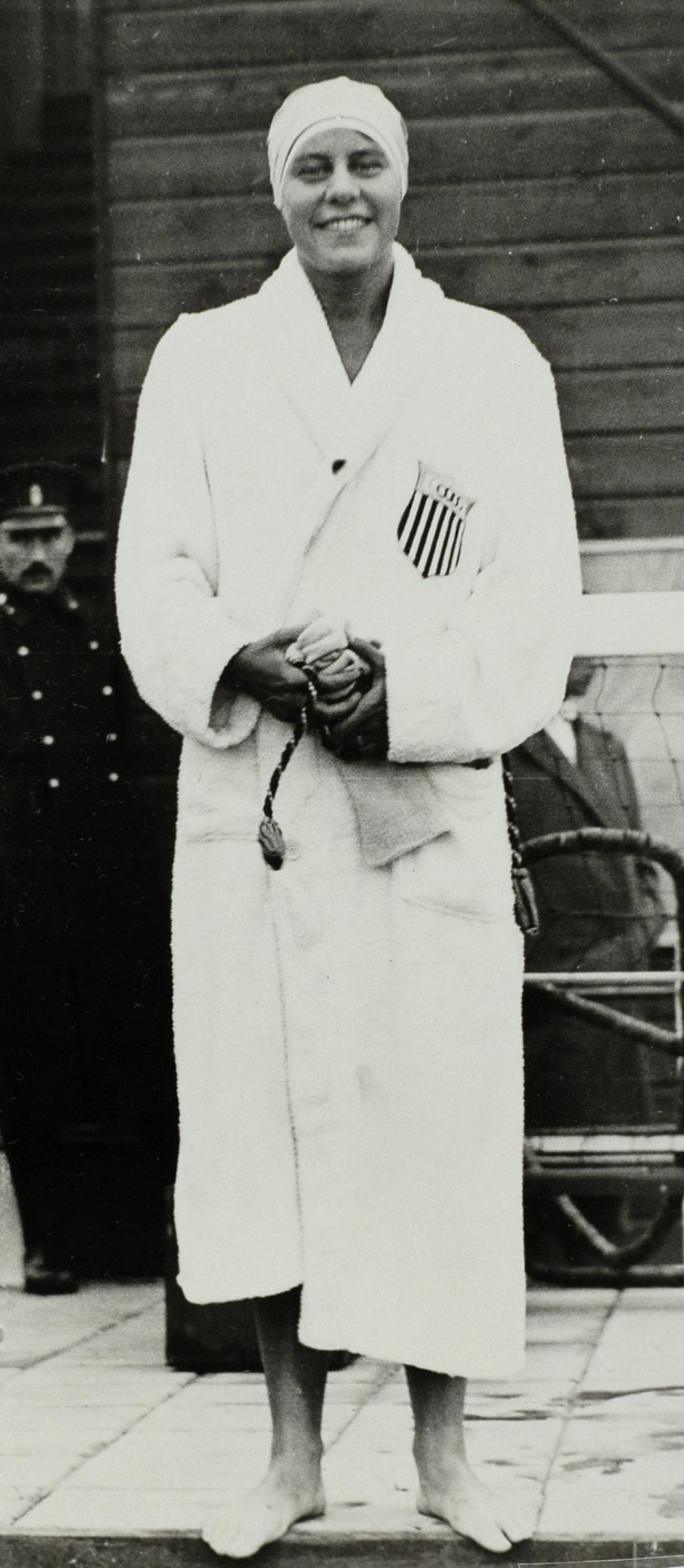 Sport. Olympische Spelen Amsterdam 1928. Zwemmen, dames : De Amerikaanse zwemster Martha Norelius